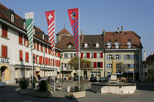 Avenches: Hôtel de Ville